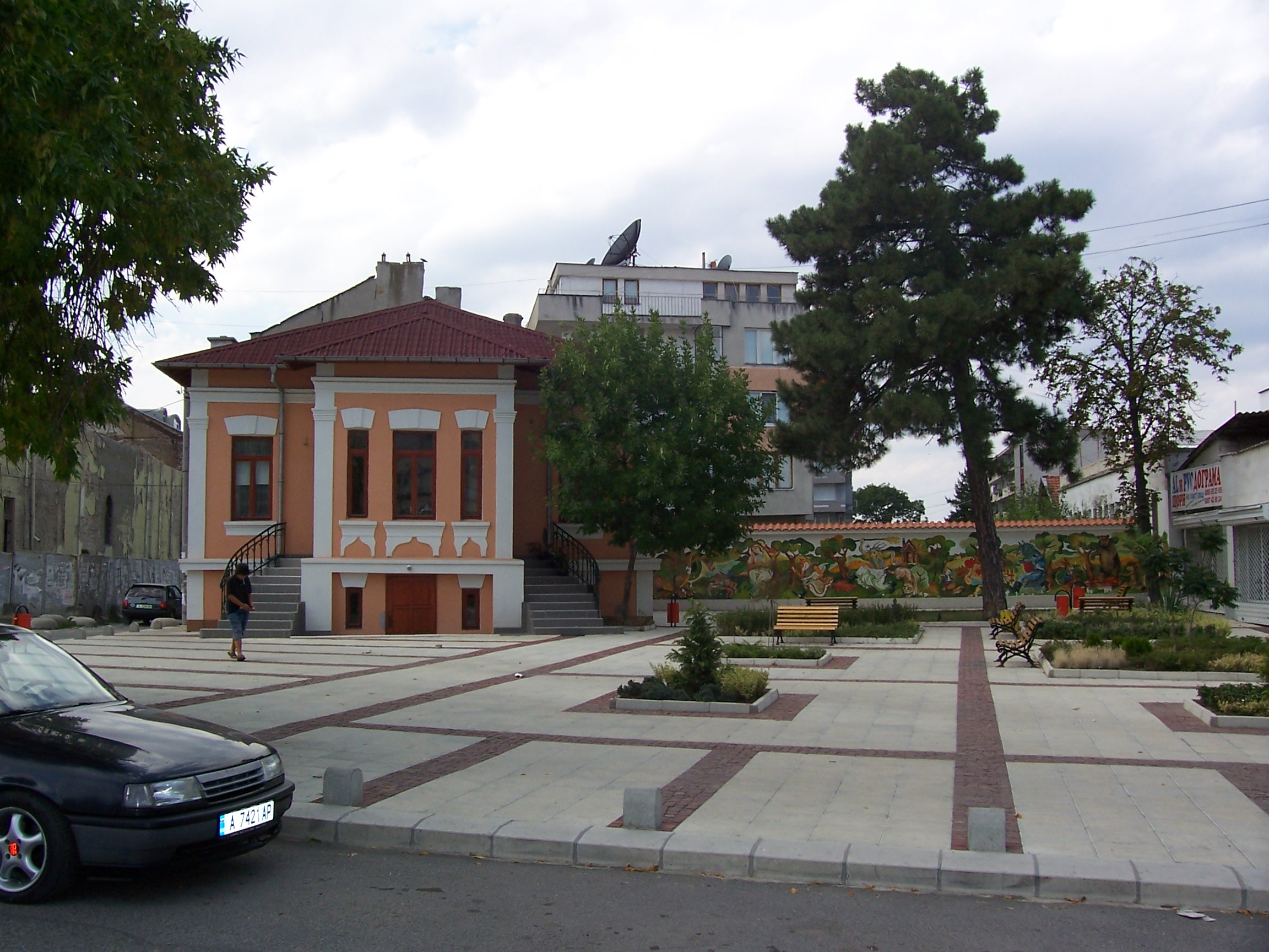 Детската библиотека след ремонта; © 2006 Димитър Колев